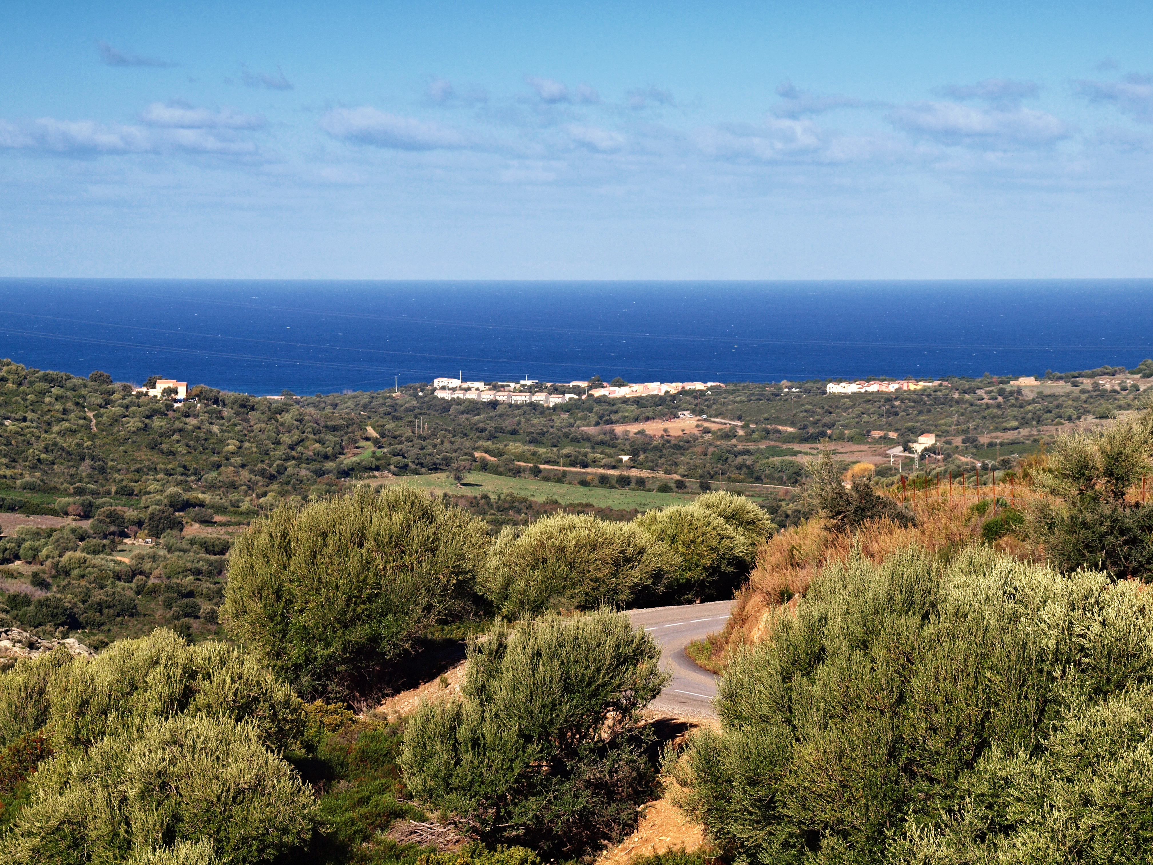 Palasca (Corsica) - Partie occidentale du littoral, avec le VVF de Lozari au centre